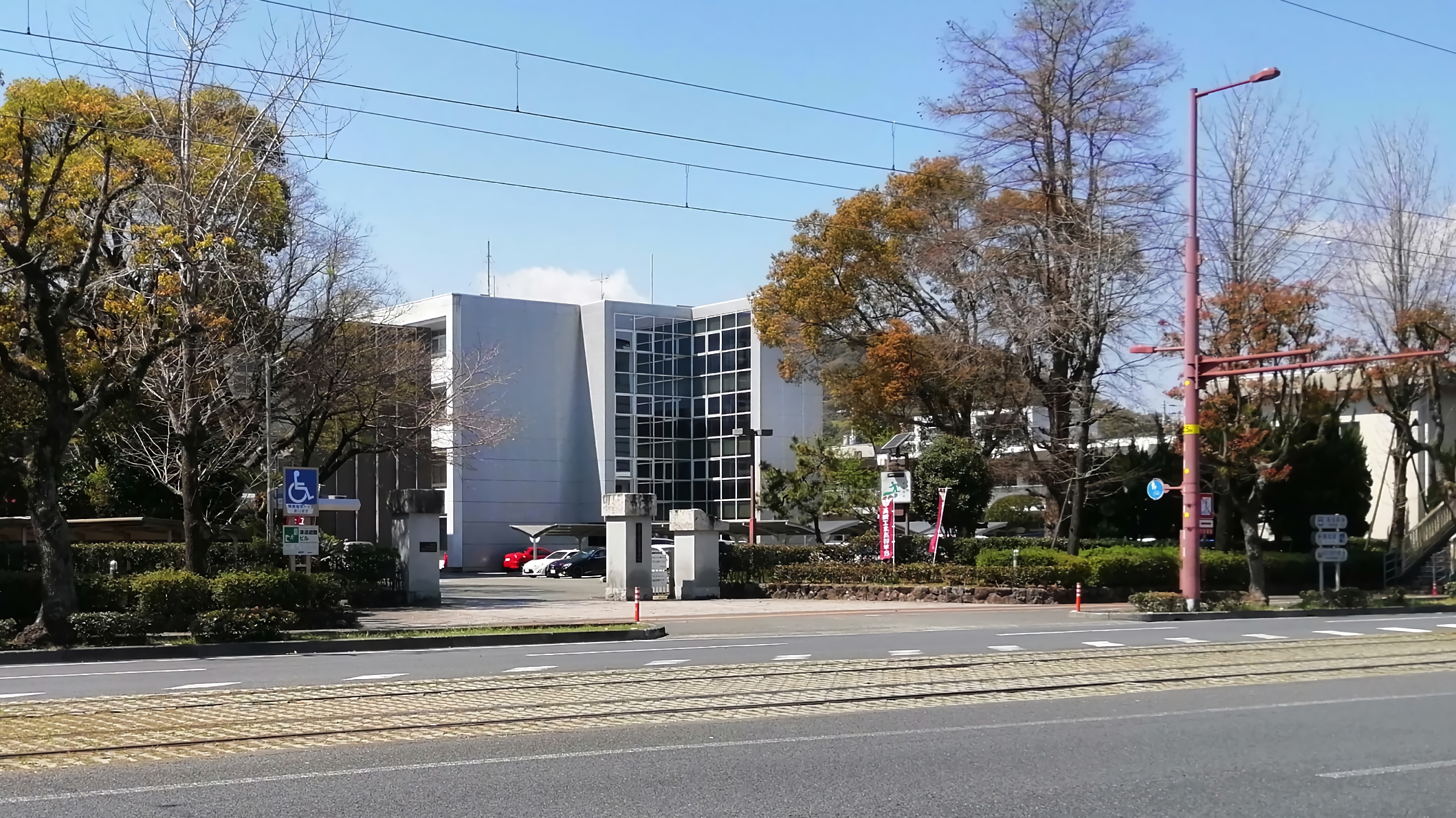 高知県立高知工業高等学校 - 正門付近